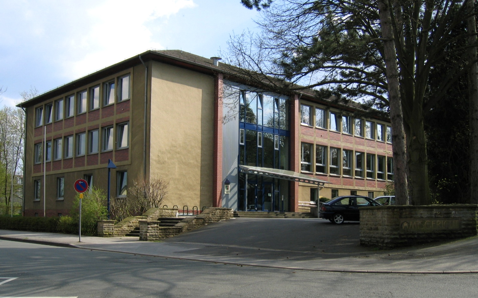 Description: Amtsgericht Menden, Heimkerweg 7 in Menden (Sauerland) Source: selbst fotografiert Date: 25. Apr. 2006 Author: Bubo